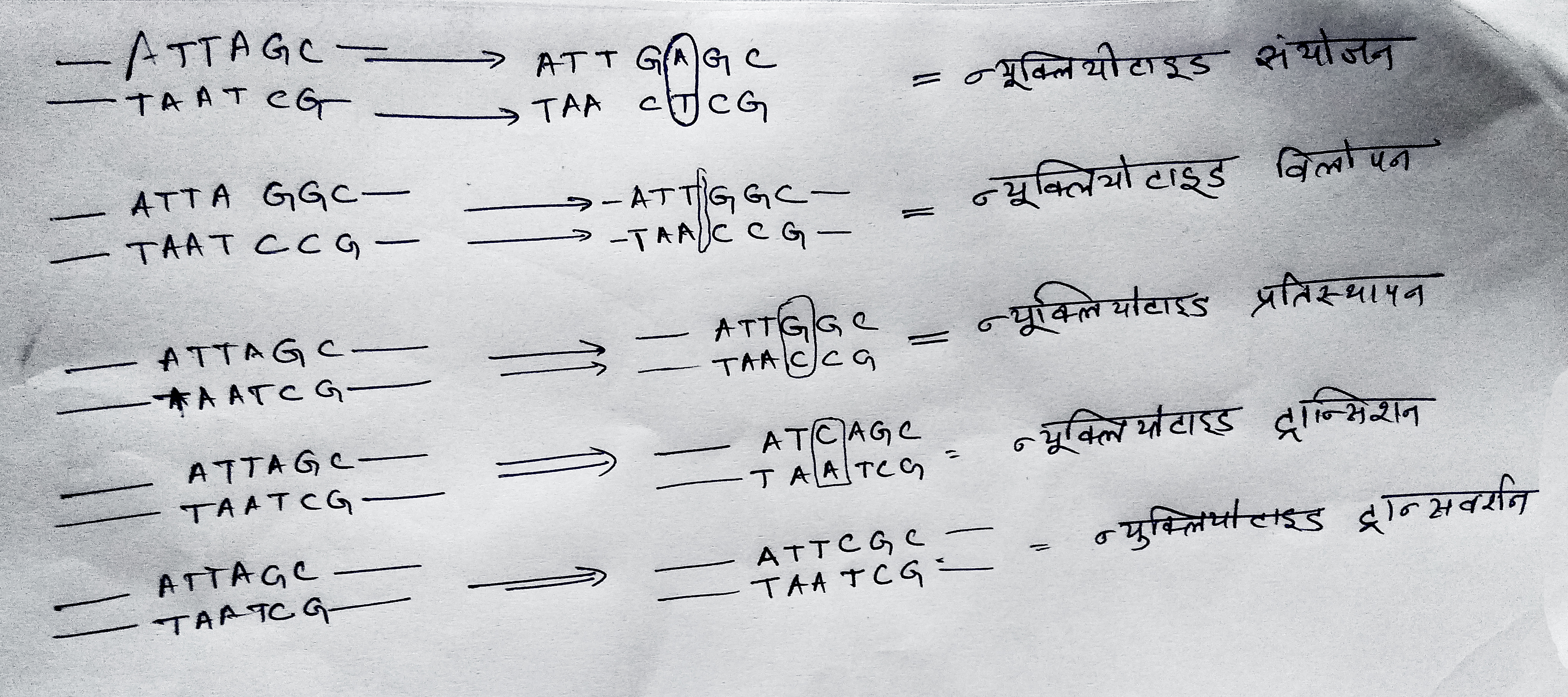 डी एन ए म्यूटेशन के कुछ प्रकार्